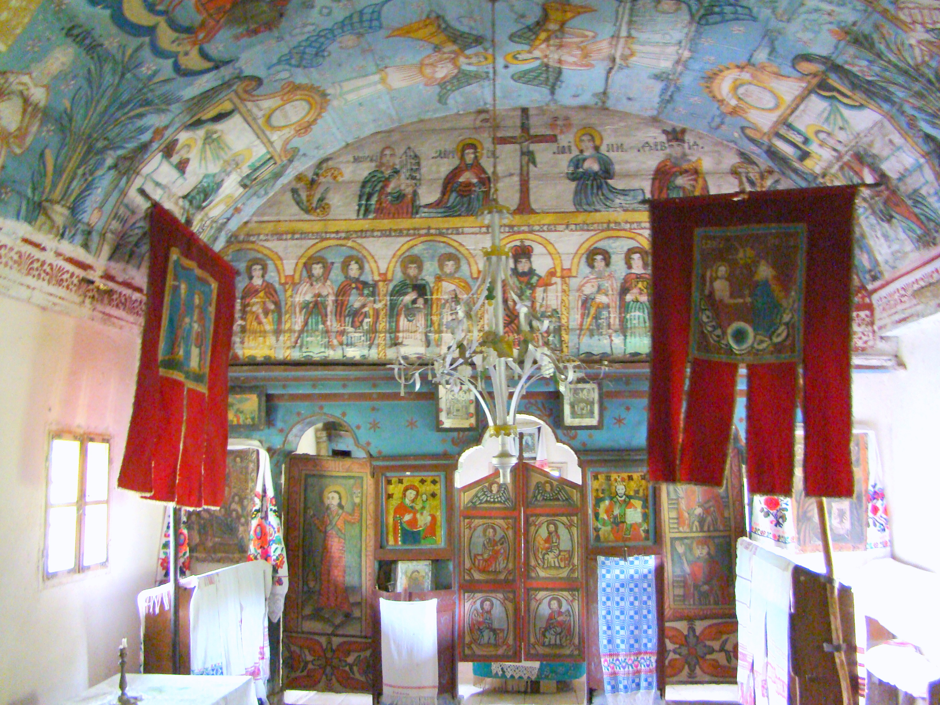 Biserica de lemn „Sf.Arhangheli” din Boiereni, județul Maramureș